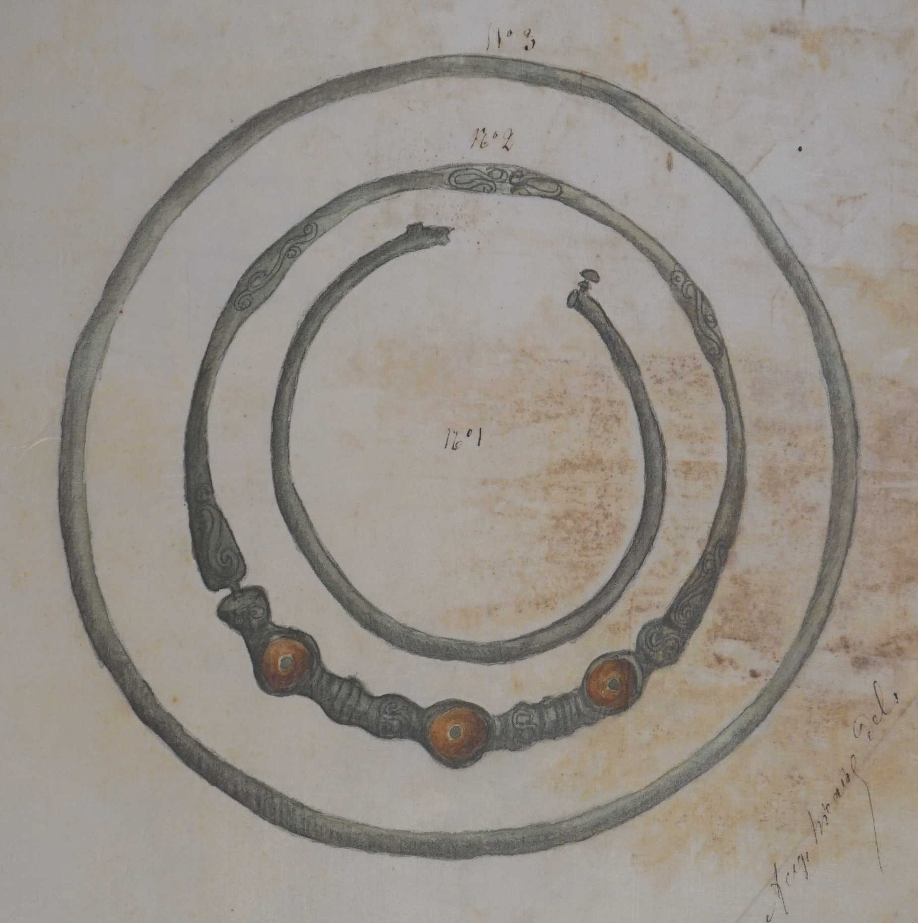 vue d'un dessin sur soie de fouilles conservé à la BMR sous la cote CLXI. fig 1 découverte à Marson, fig 2 à Prosnes.